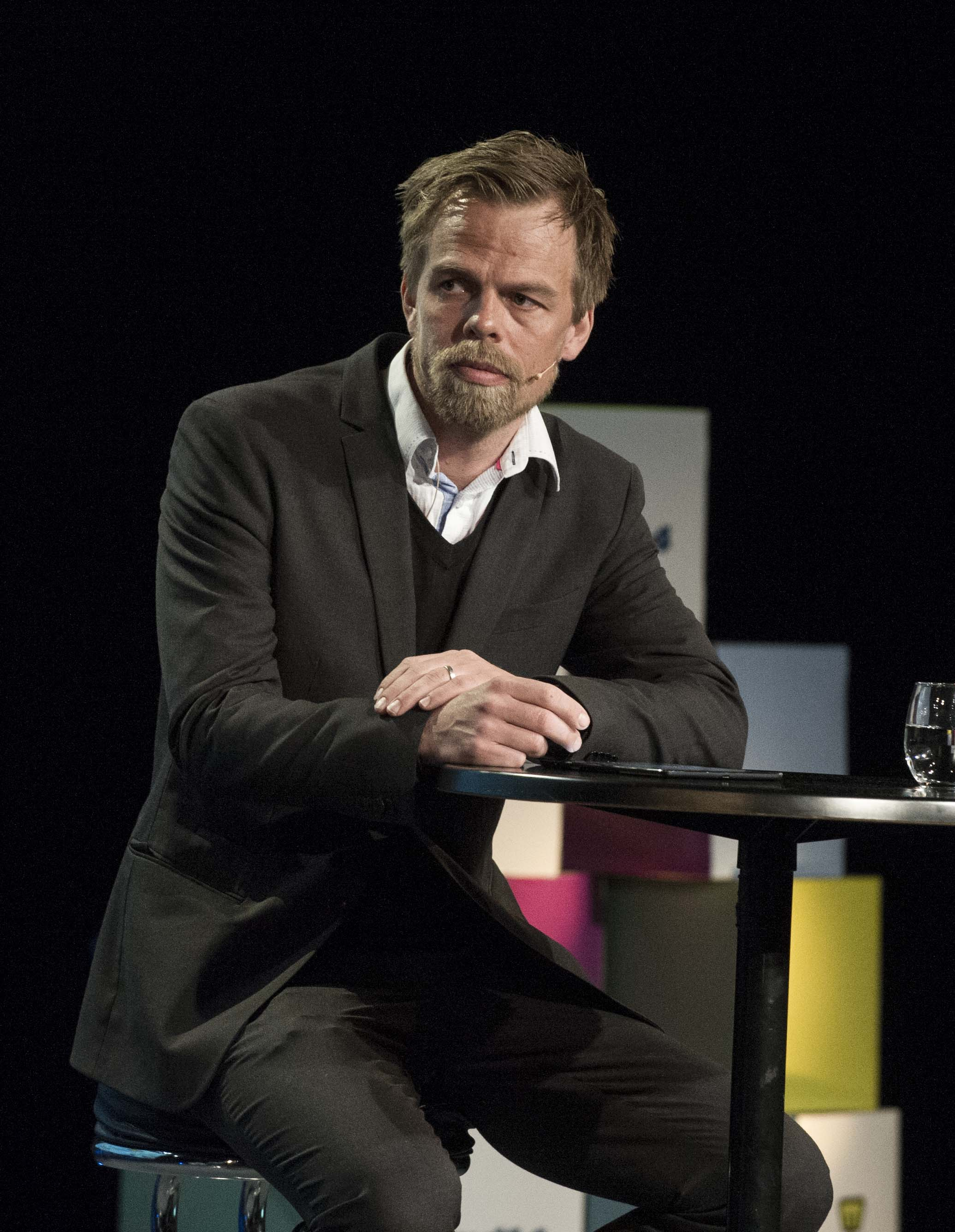 Medvirkende: Petter Bae Brandtzæg (SINTE ), Ola Stenberg (VG), Ingeborg Volan (NKR). Moderator: Anders Waage Nilsen (Netlife Research)